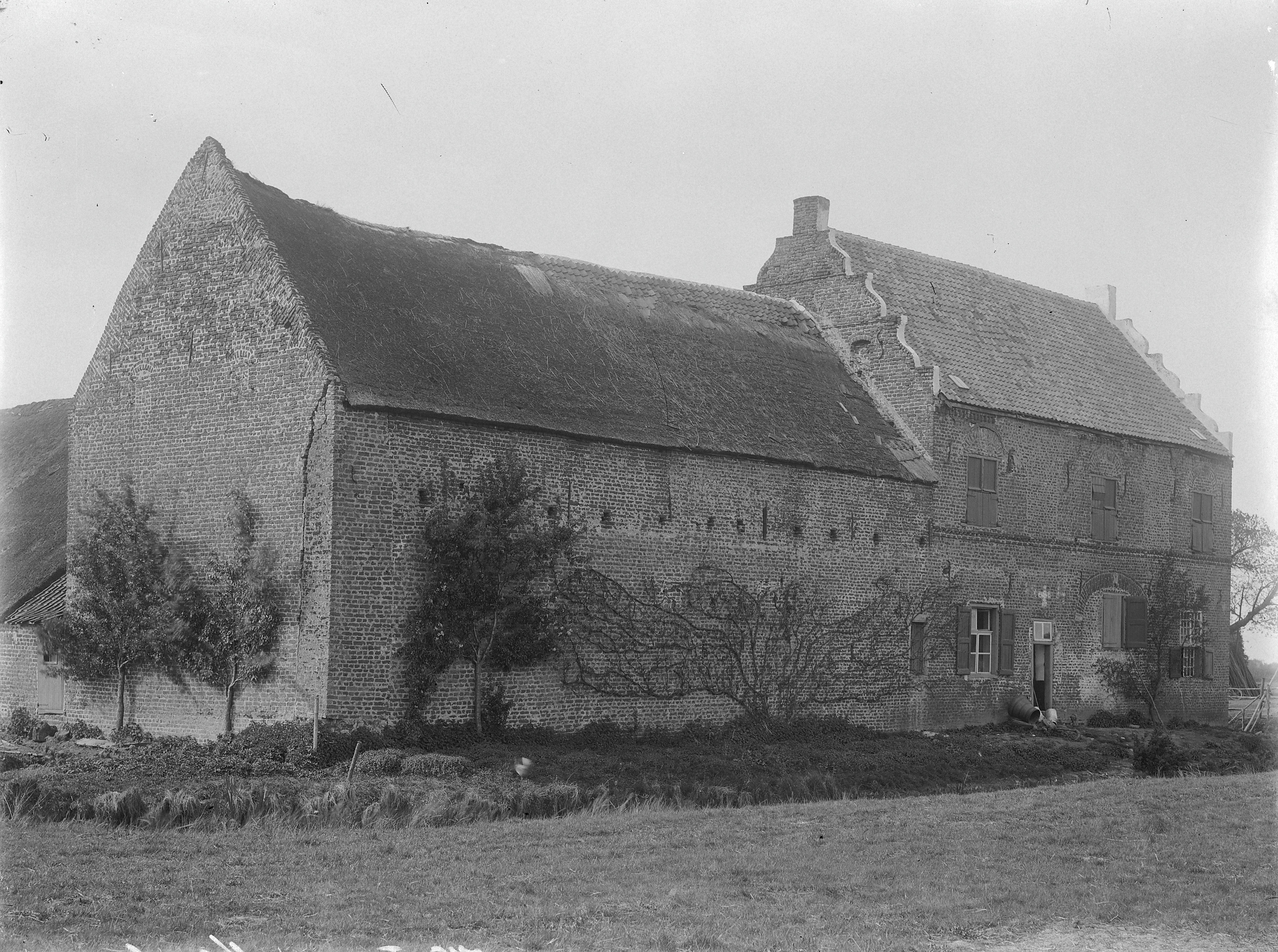 Huis Westering: Overzicht zijgevel